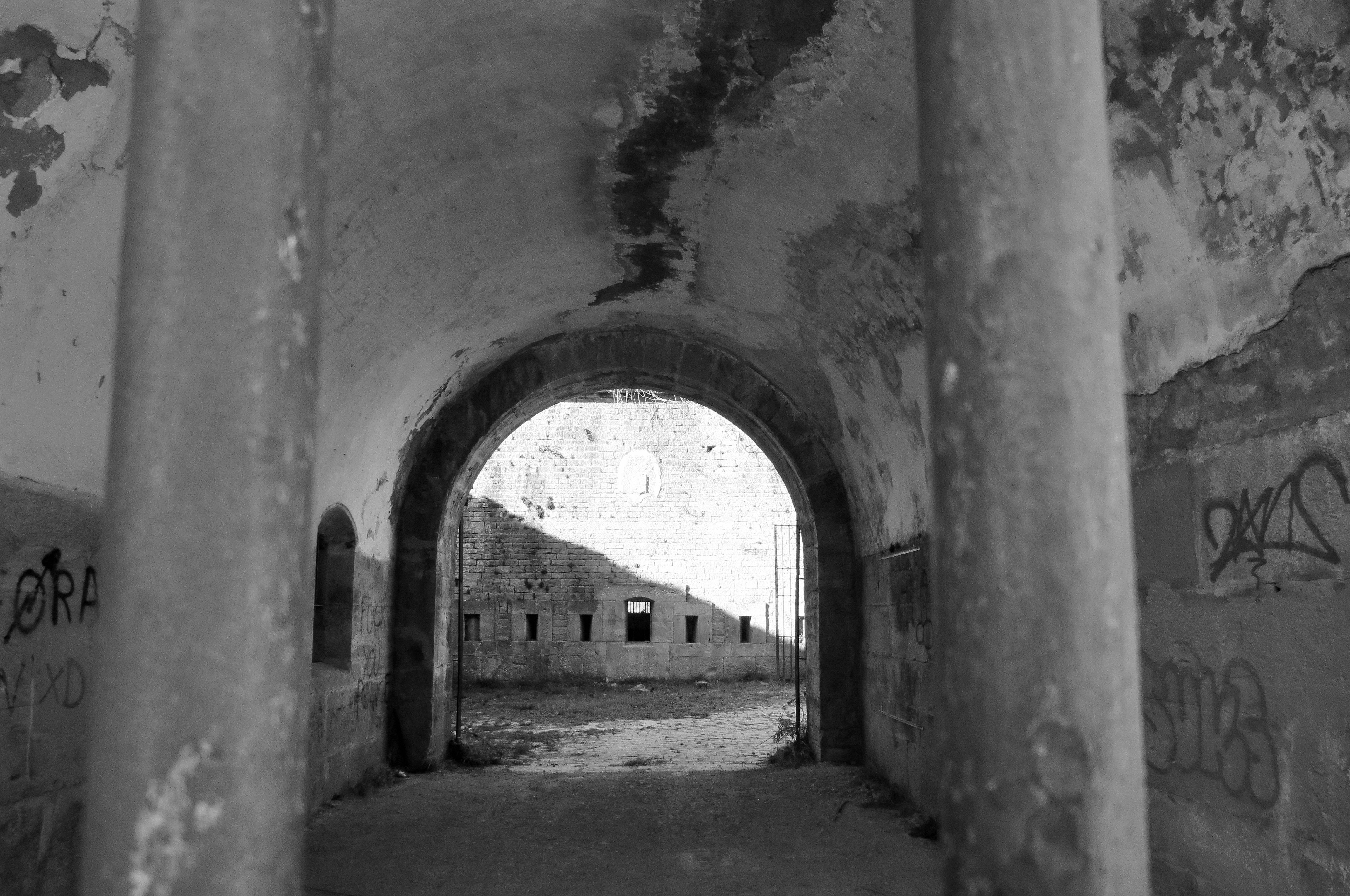 San Kristobalgo gotorlekuko ataria, Ezkaba mendian, Nafarroa